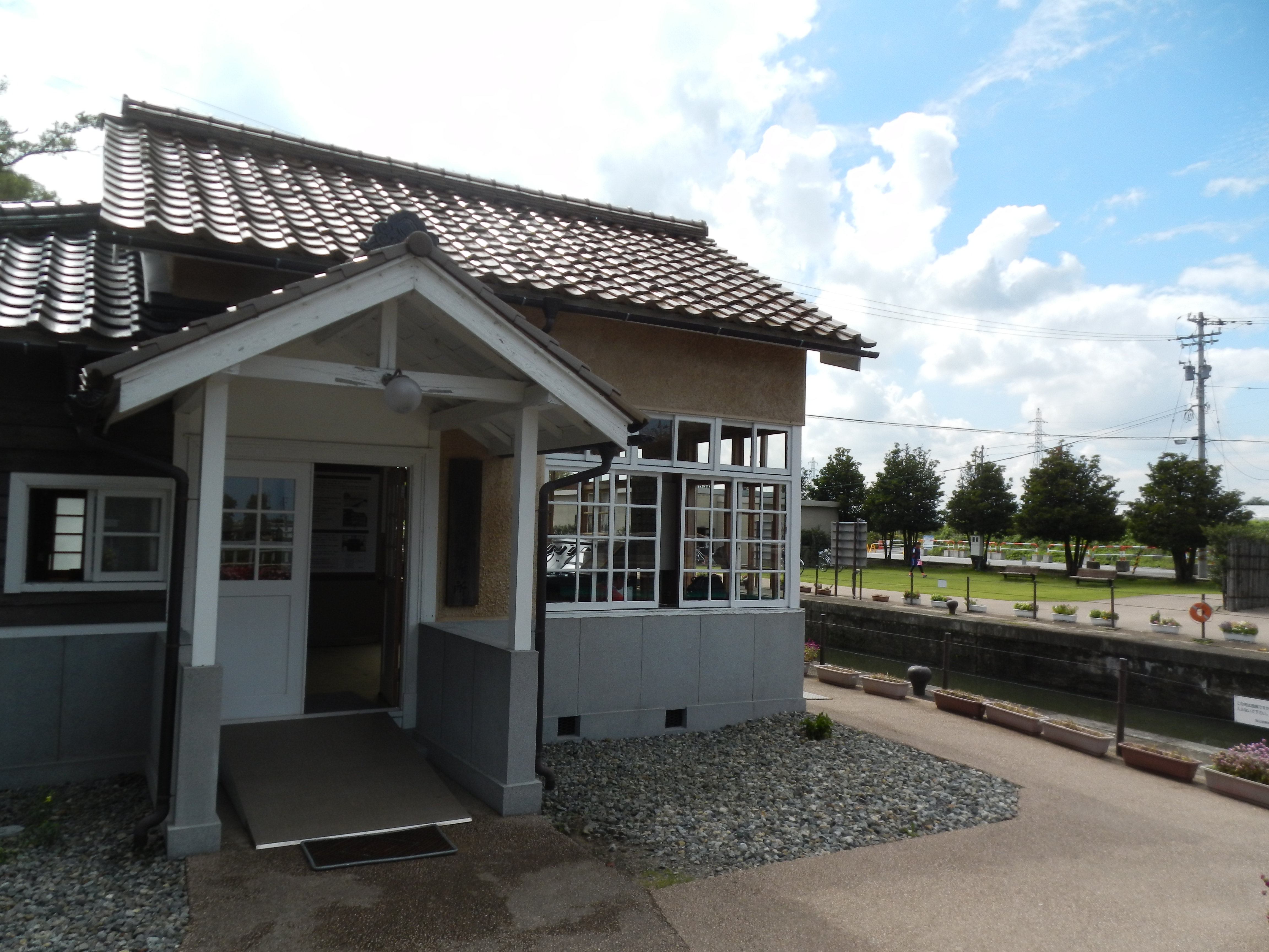 2 Kōjinmachi, Toyama-shi, Toyama-ken 930-0809, Japan